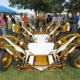 While designing the lunar truck, JSC engineers threw out some traditional assumptions on what a vehicle needs -- for instance, doors and seats -- and added interesting new capabilities such as active suspension, six-wheel drive with independent steering for each wheel